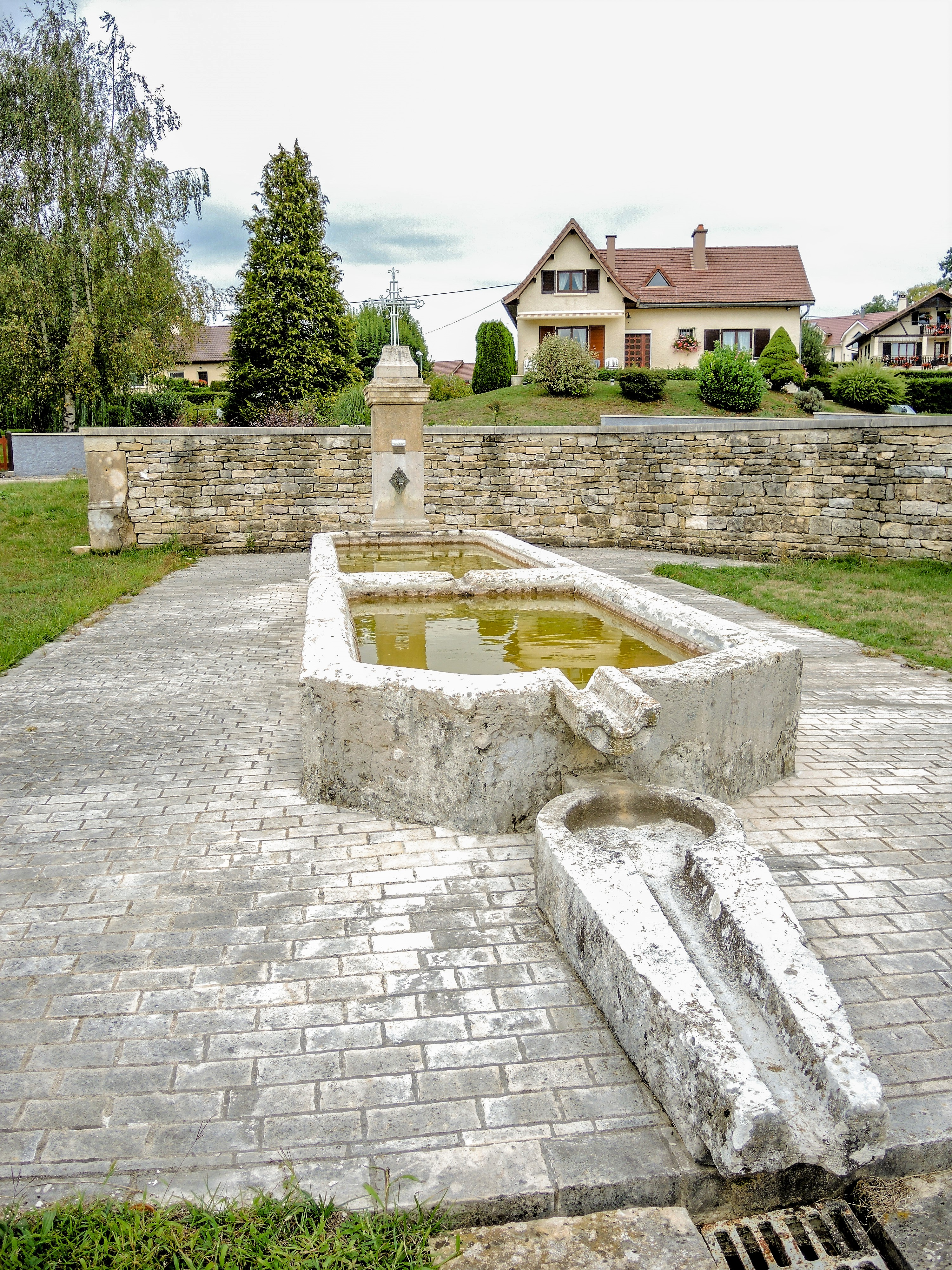 Fontaine-lavoir-abreuvoir, à Rahon. Doubs